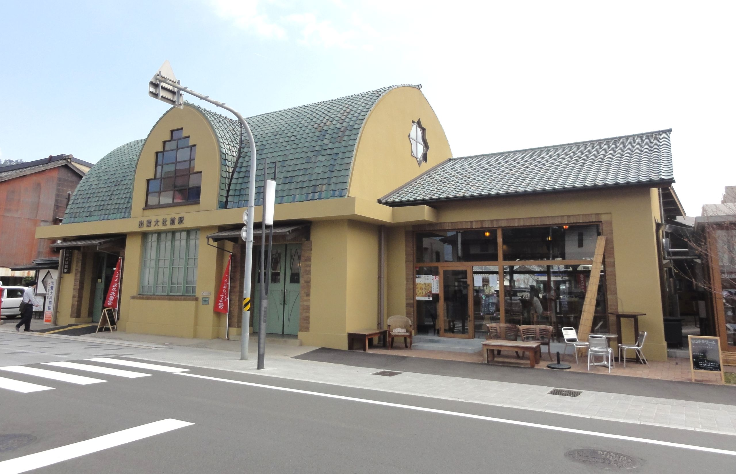 一畑電気鉄道 出雲大社駅